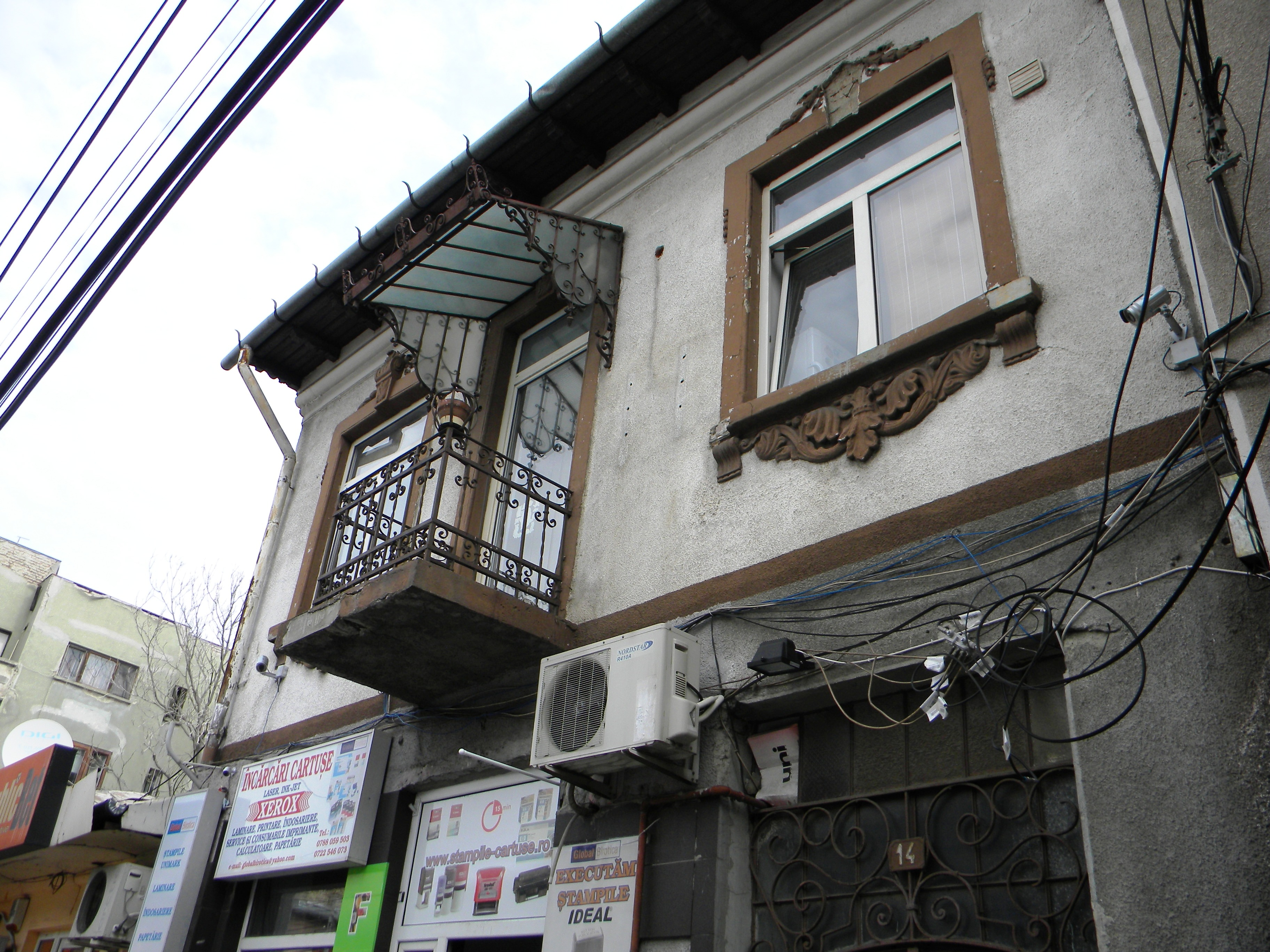 Bucuresti, Romania, Casa pe Str. Lizeanu nr. 14, sect. 2